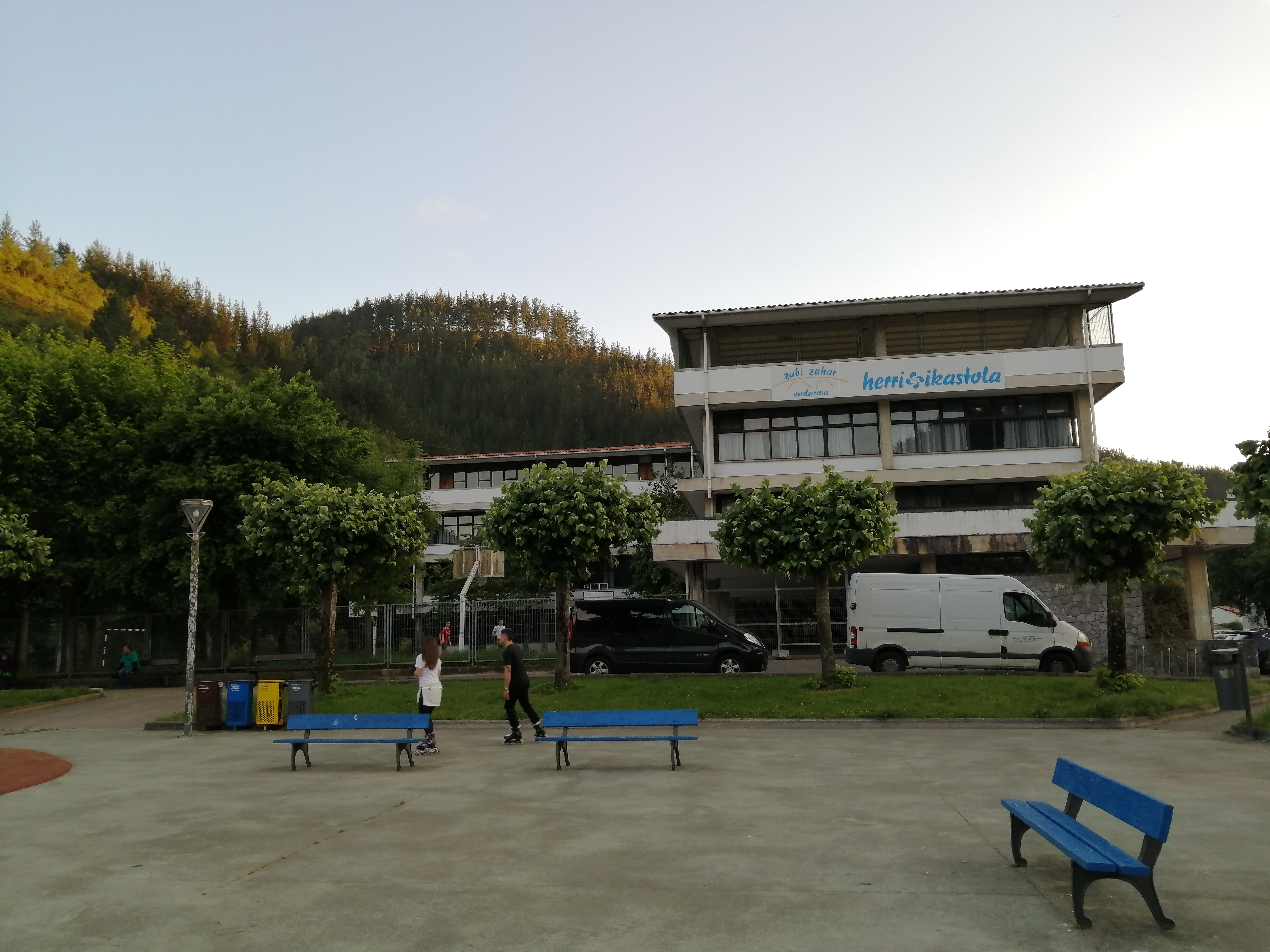 Ondarroako Zubi Zahar Ikastola